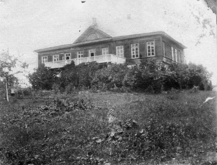 Барский дом дворян Воробьёвых, а впоследствии Дервизов в Домотканово (ныне разрушен). Дореволюционная фотография